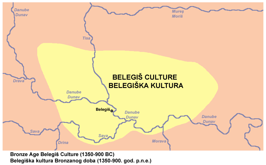 Bronze Age Belegiš Culture or Belegiš Group (1350-900 BC).Belegiška kultura (Belegiška grupa) Bronzanog doba (1350-900. god. p.n.e.).